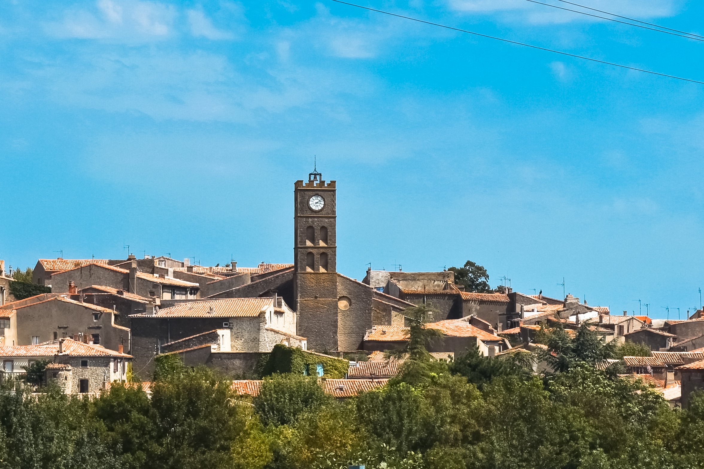 Église Sainte-Foy .